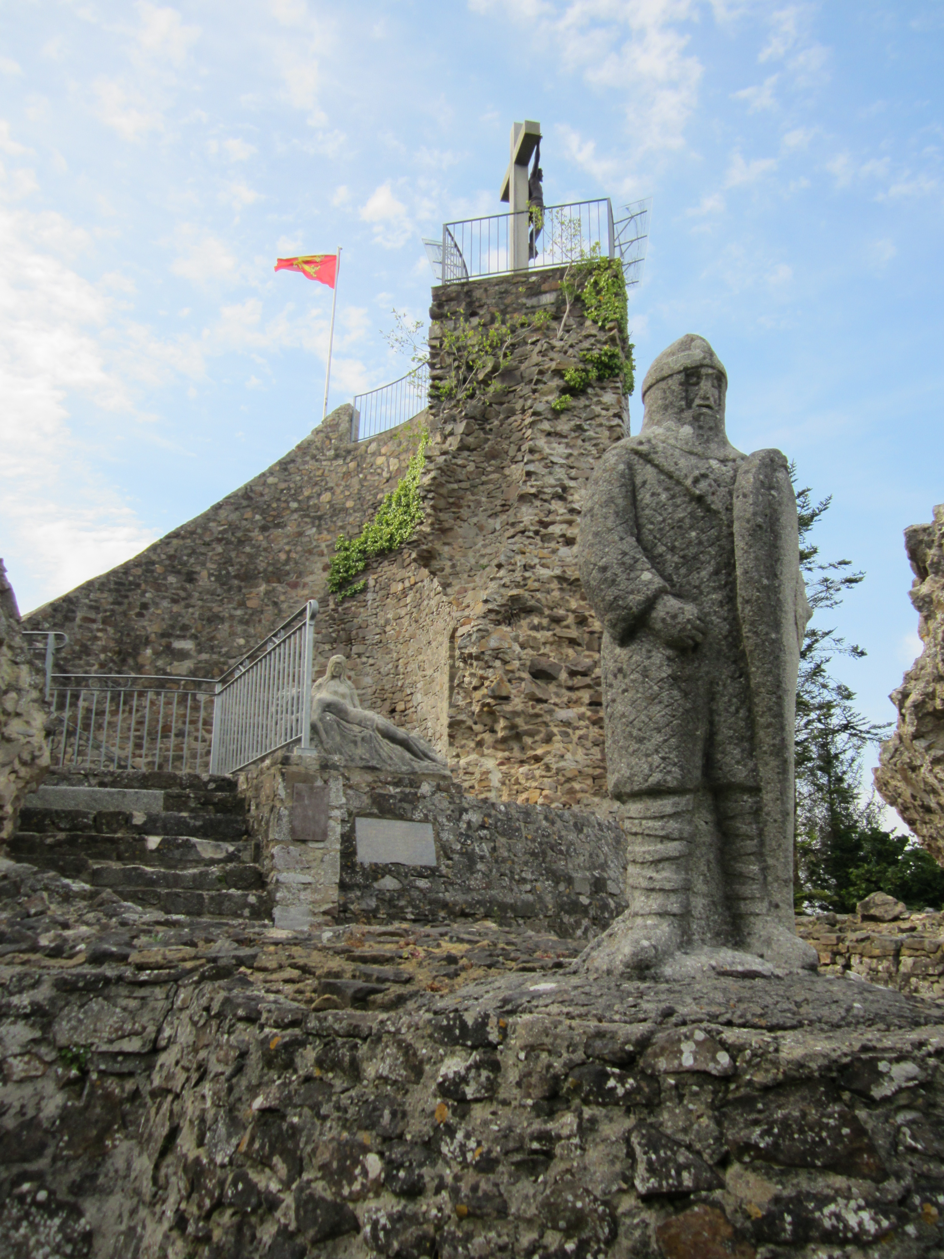 Donjon du Plessis